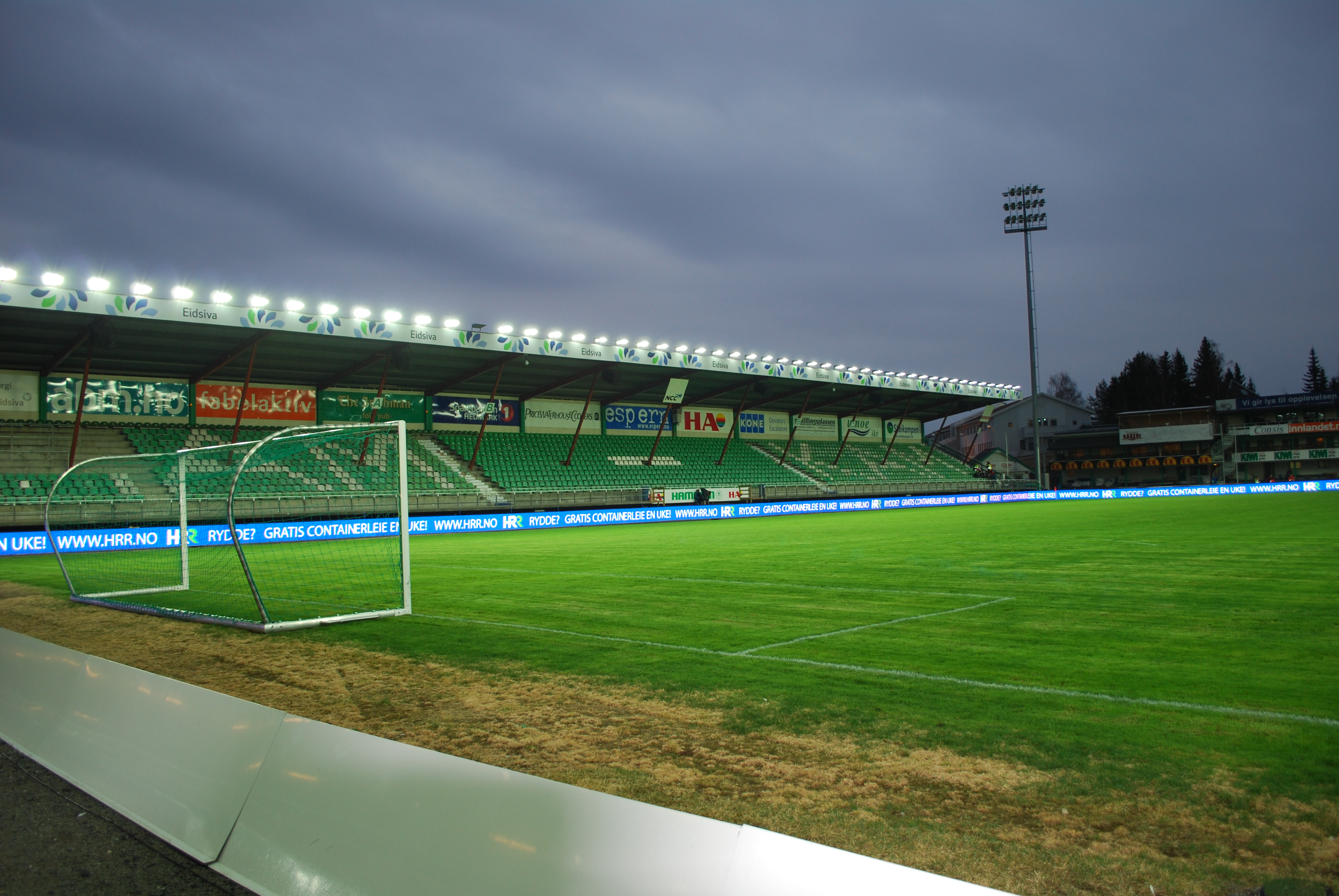 Den gamle sittetribunen ved Briskeby gressbane, Hamarkameratenes hjemmebane på Hamar.